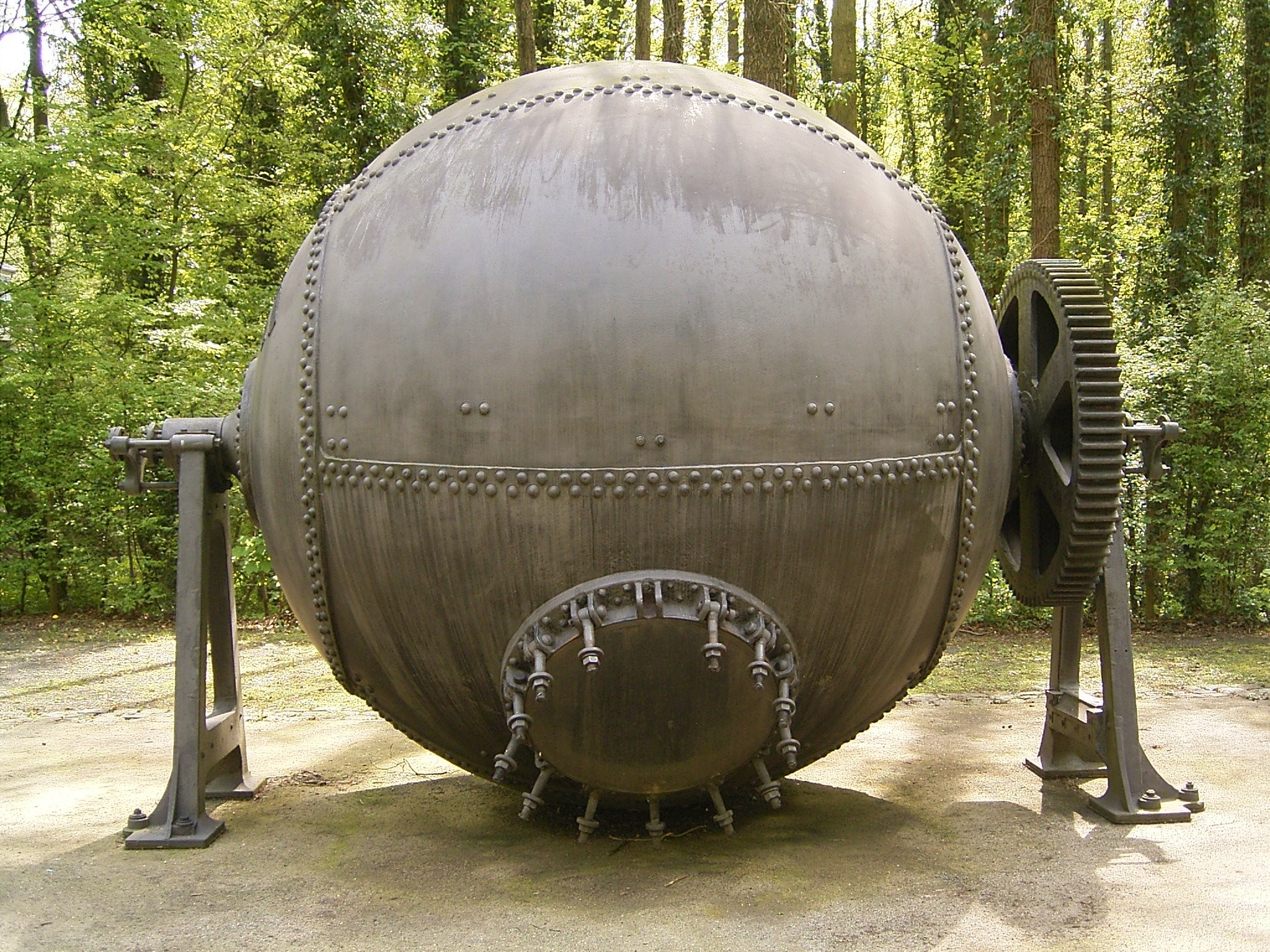 Papiermühle Alte Dombach in Bergisch Gladbach